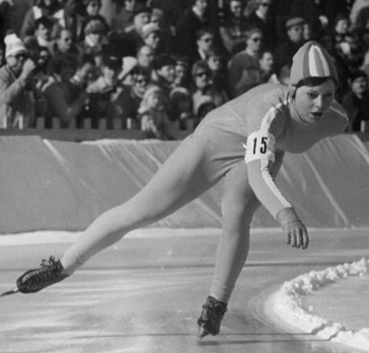 Andrea Mitscherlich ADN-ZB Gahlbeck 6.2.77-str-Karl-Marx-Stadt: DDR-Eisschnellaufmeisterschaften der Sprinter-Nach zwei Läufen liegt bei den Damen Andrea Mitscherlich, die Silbermedaillengewinnerin von Innsbruck (SC Einheit Dresden), nach einem Sieg über 1000m und einem dritten Platz über 500m an der Spitze. Die Entscheidung um den Meistertitel fällt nach zwei weitern Läufen am 6.2., den zweiten Tag dieser Meisterschaft. (Foto von einem früheren Wettkampf)